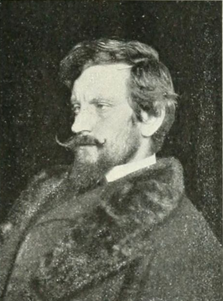 Il pittore Mario de Maria.